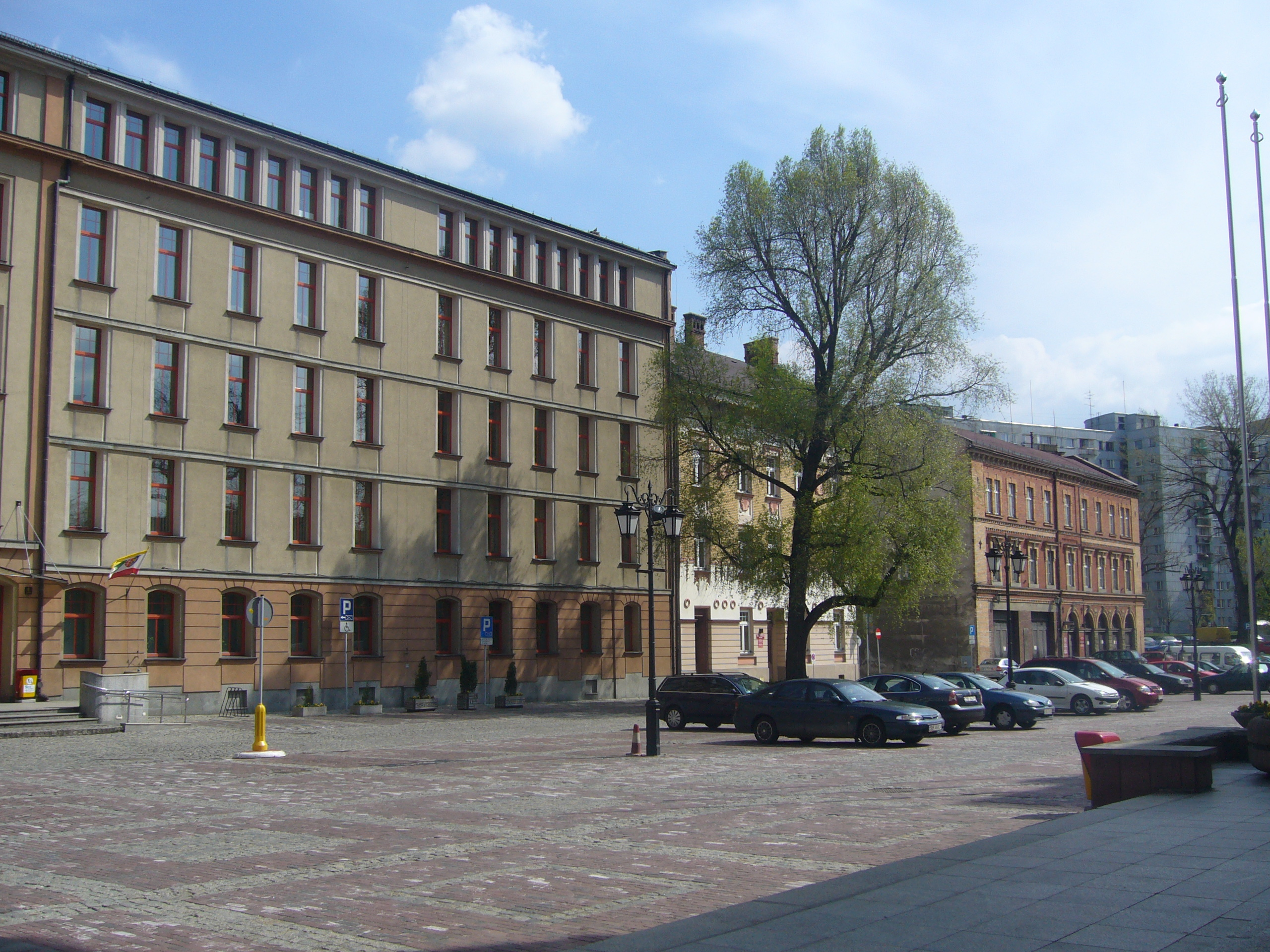 Rathaus Platz in Bielitz-Biala